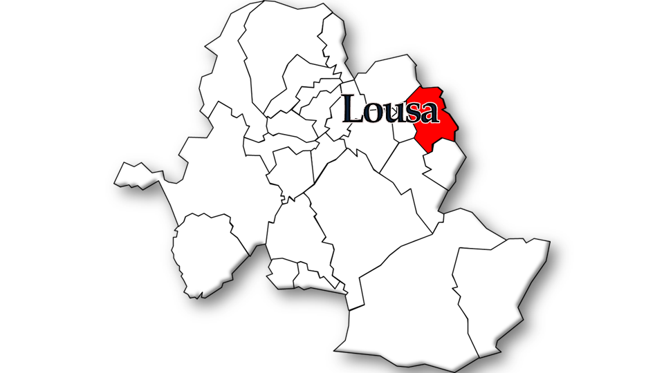 População